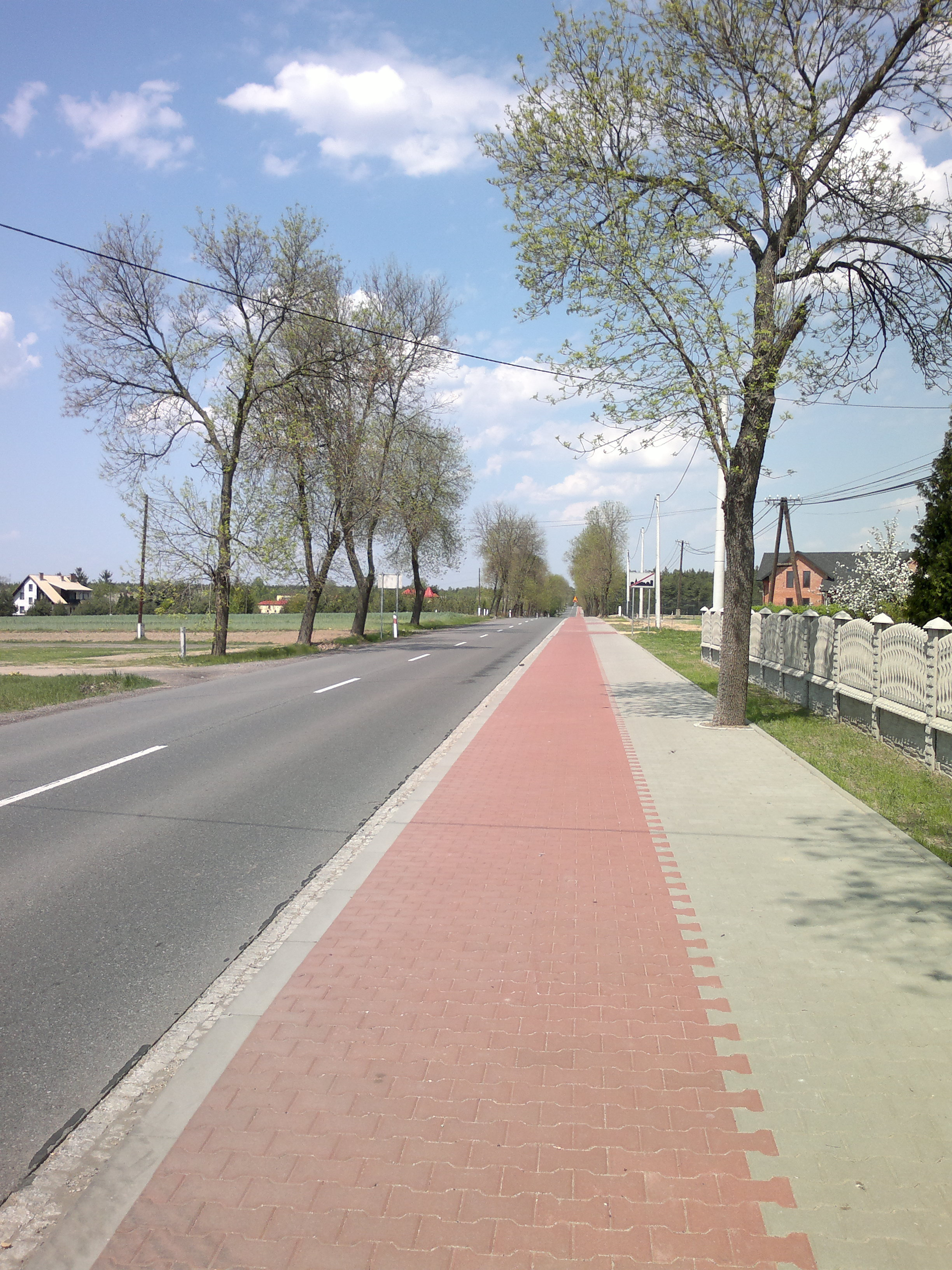 Widok na koniec wsi